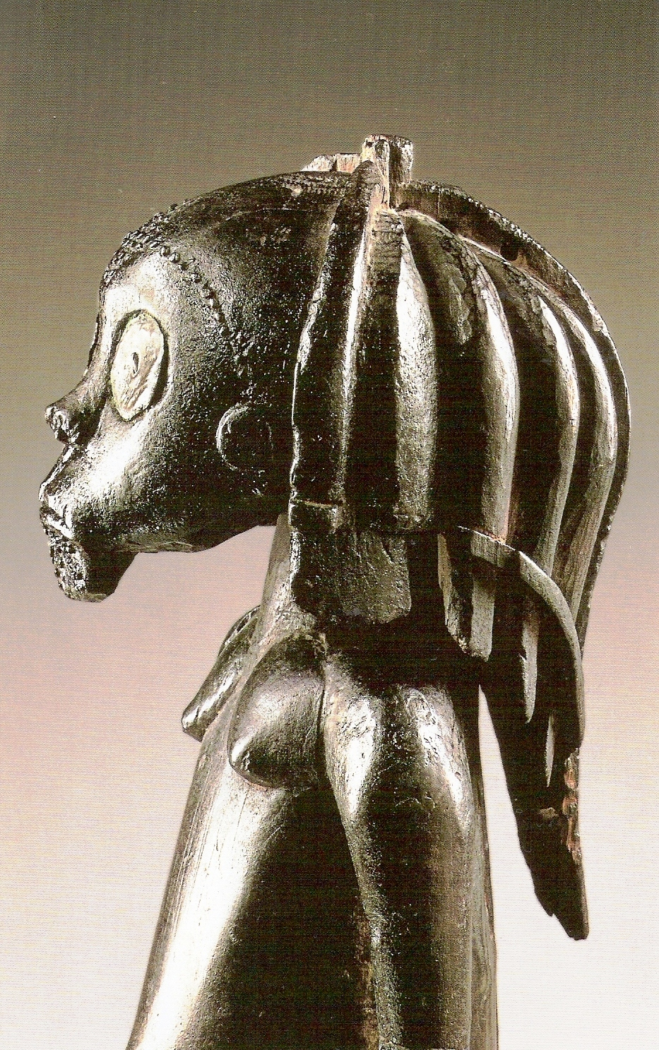 Figure de reliquaire, éyéma byeri. Fang. République gabonaise. Bois, pigment et métal. H. 70 cm, détail. Musée Dapper, Paris